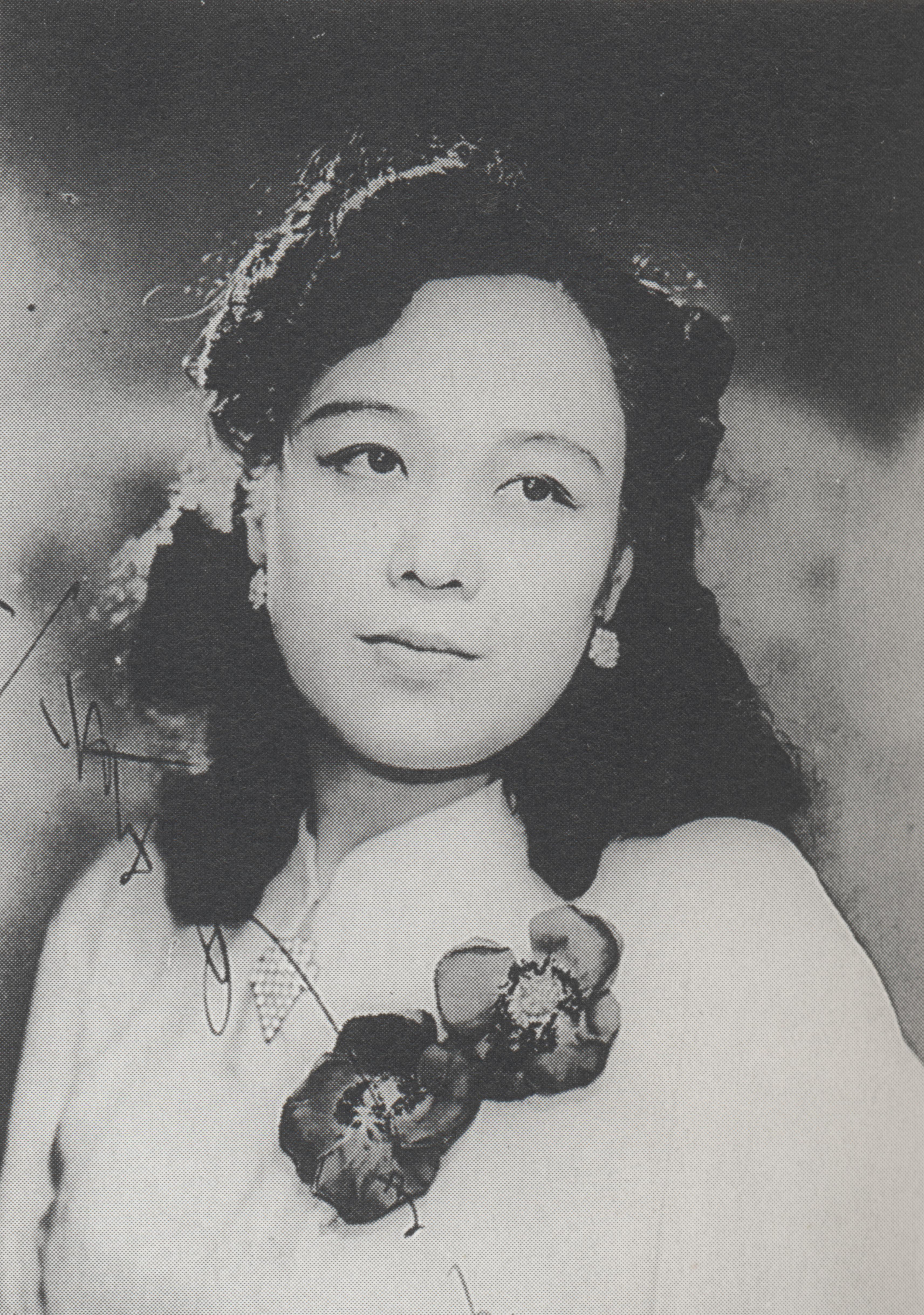 1930年代に発売された二葉あき子の写真をスキャナでスキャン